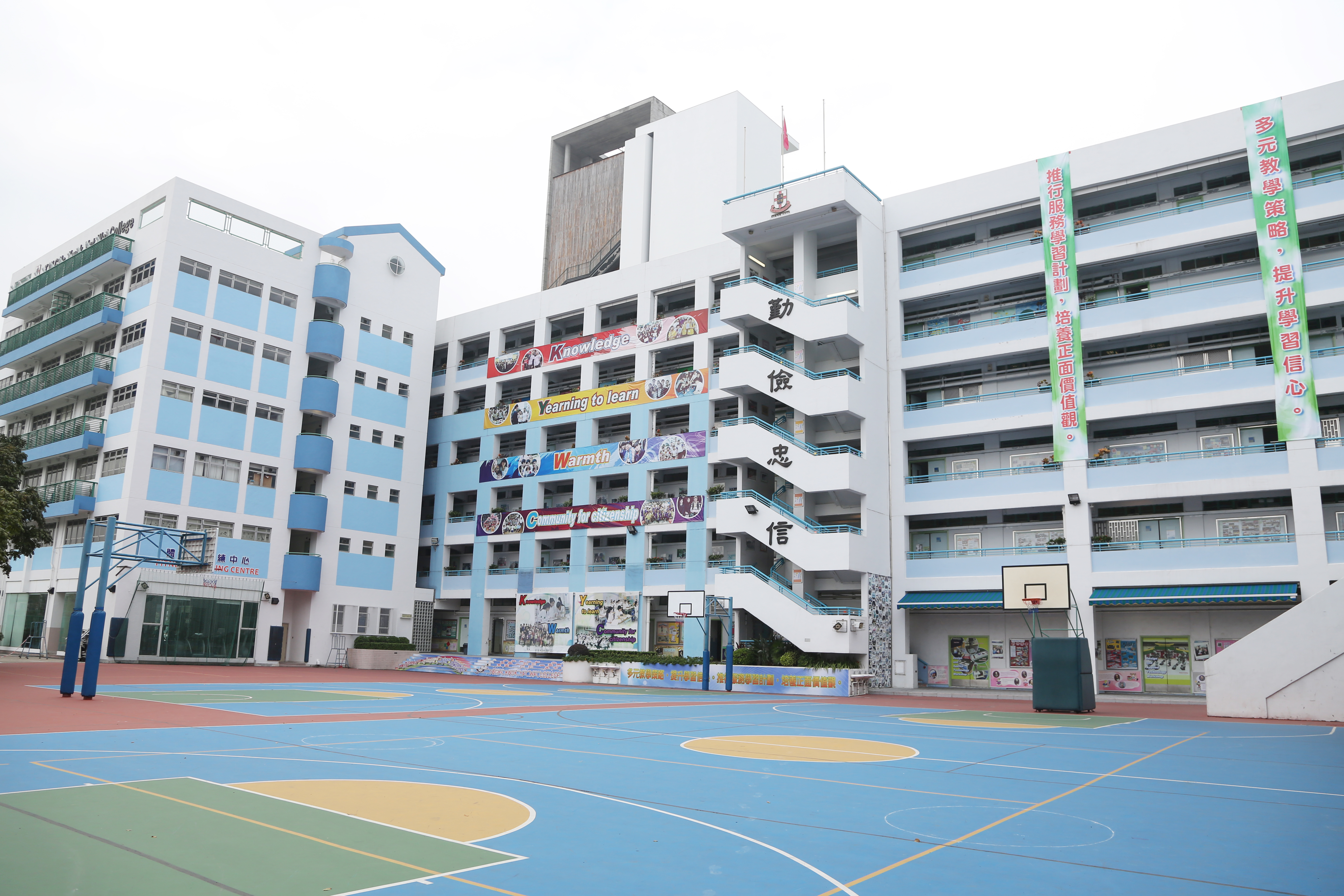 中文（香港）: 東華三院郭一葦中學校舍外貌